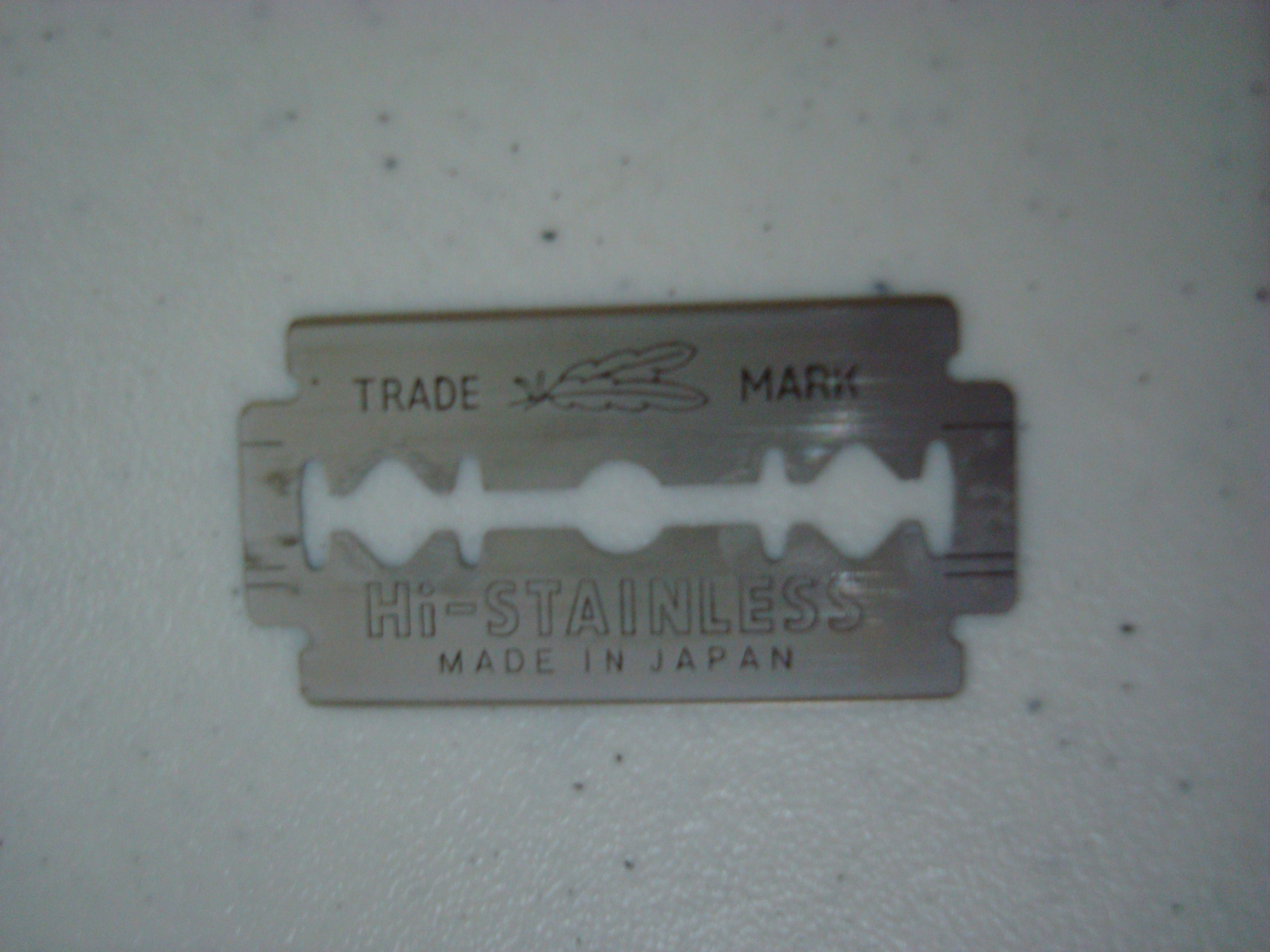 Cuchilla Feather